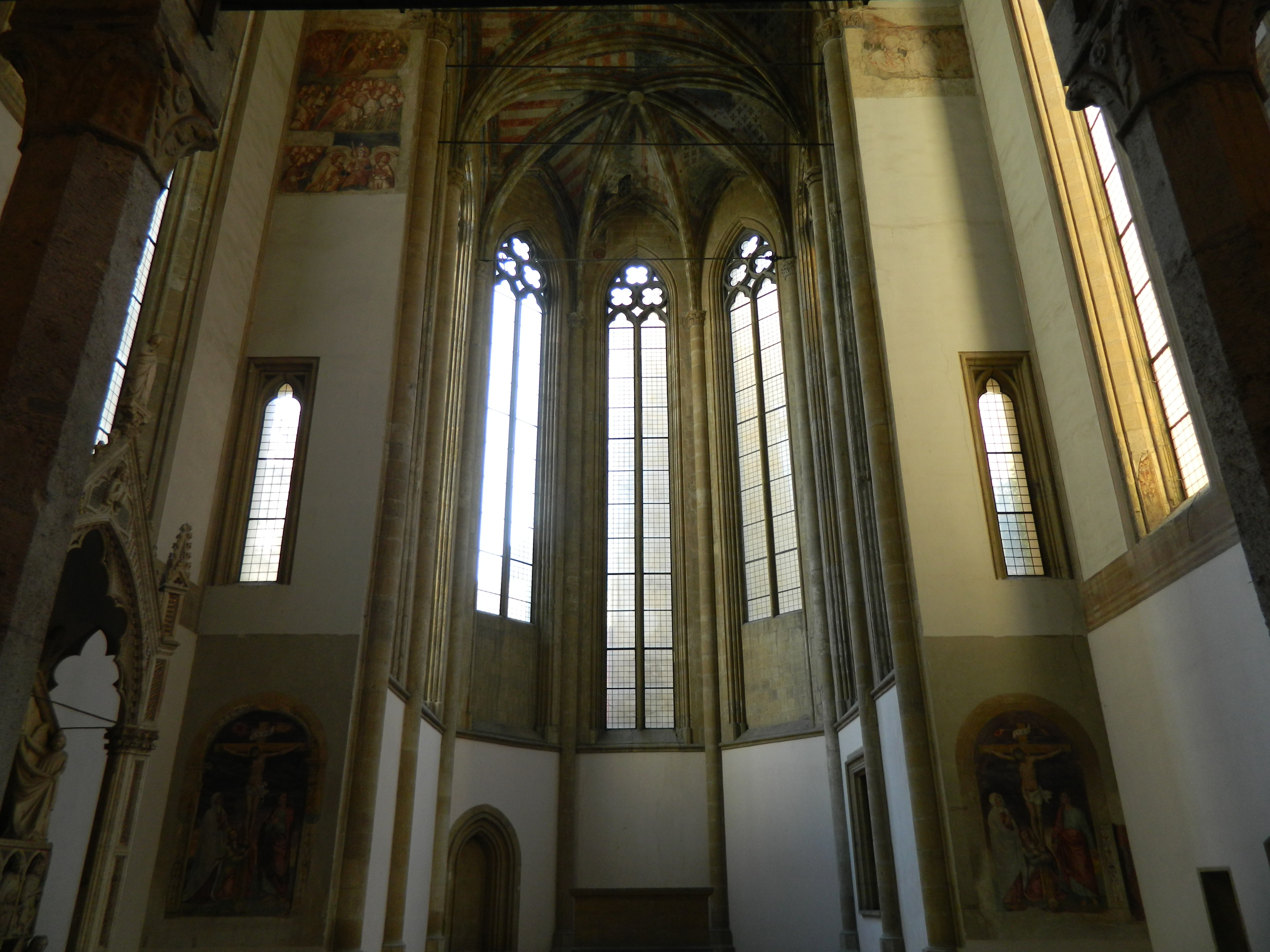 Chiesa di Santa Maria Donnaregina Vecchia (Napoli) - Abside